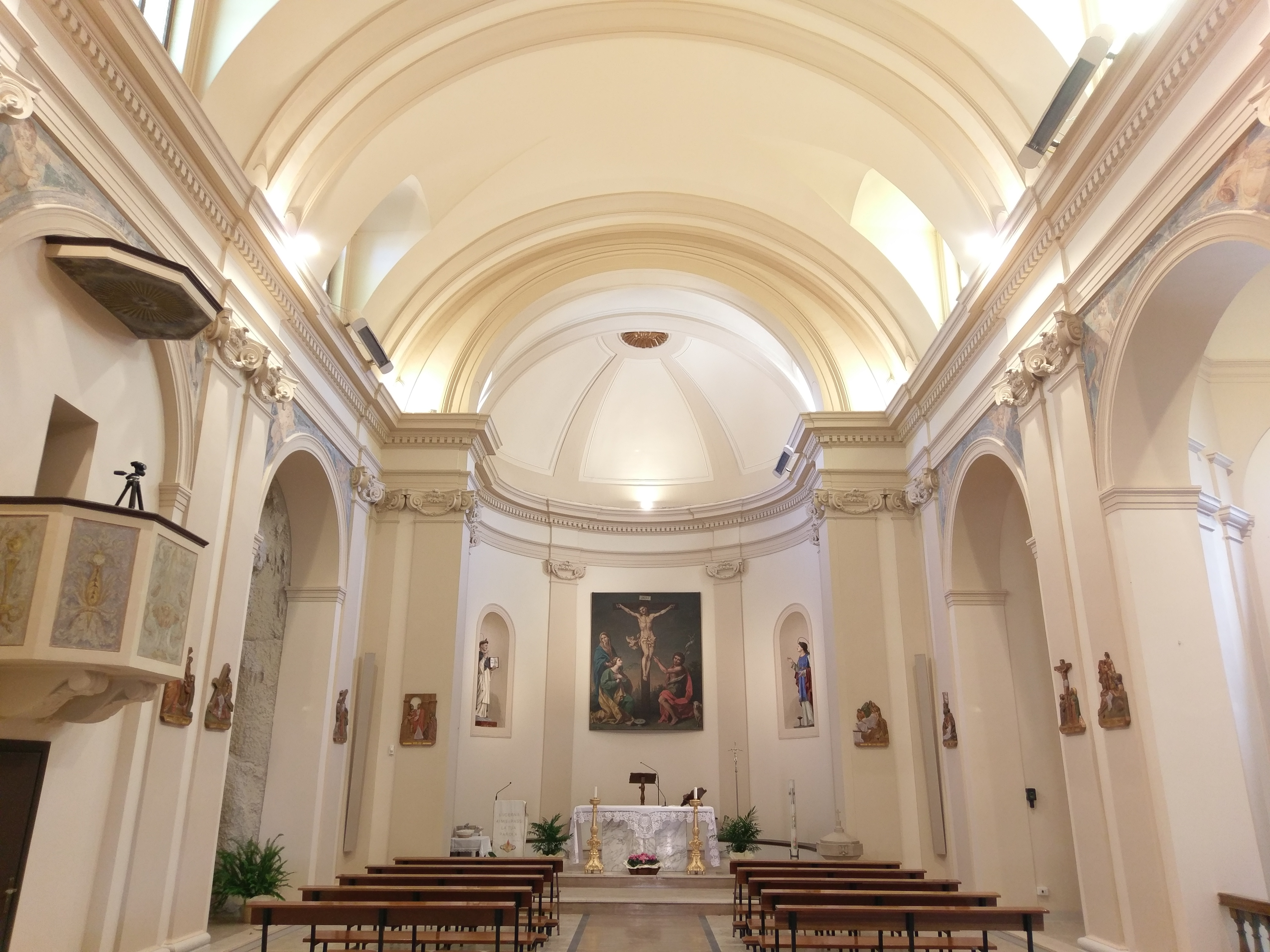 Intrerno della chiesa di Santa Lucia di Piagge dopo i lavori di restauro del 2019